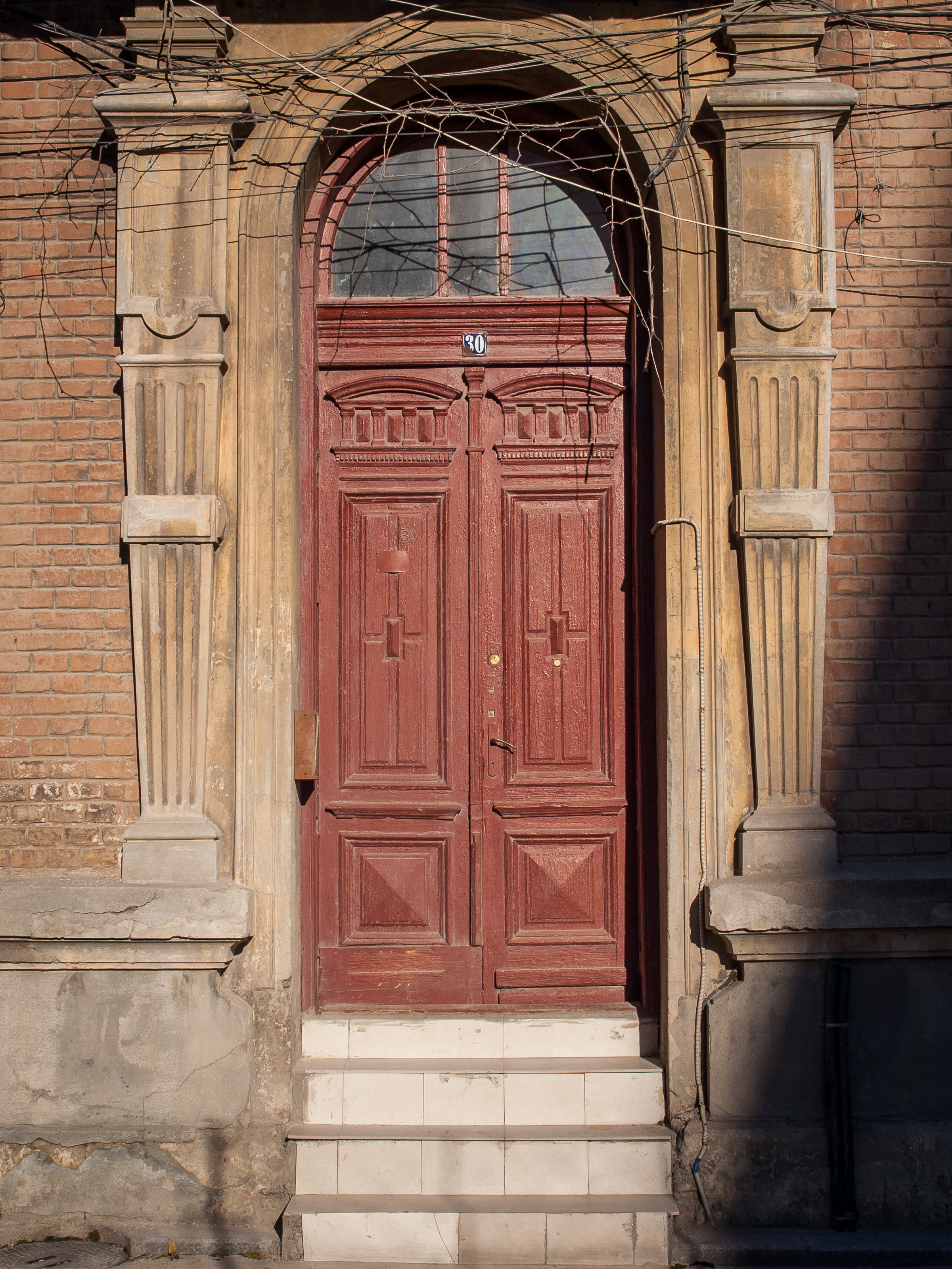 Casa se află pe Str. Mircea cel Bătrân 30 din Constanța.